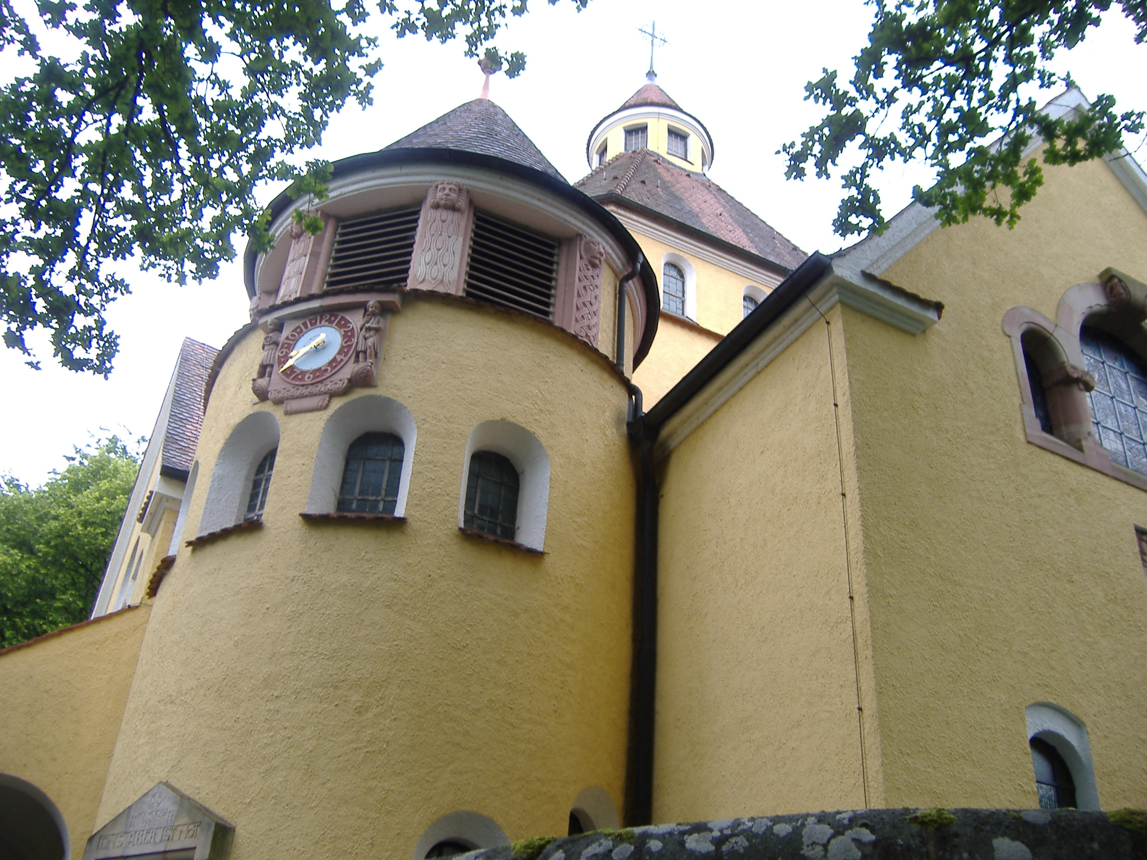 Evang. Luth. Christuskirche Staatsbad Bad Brückenau